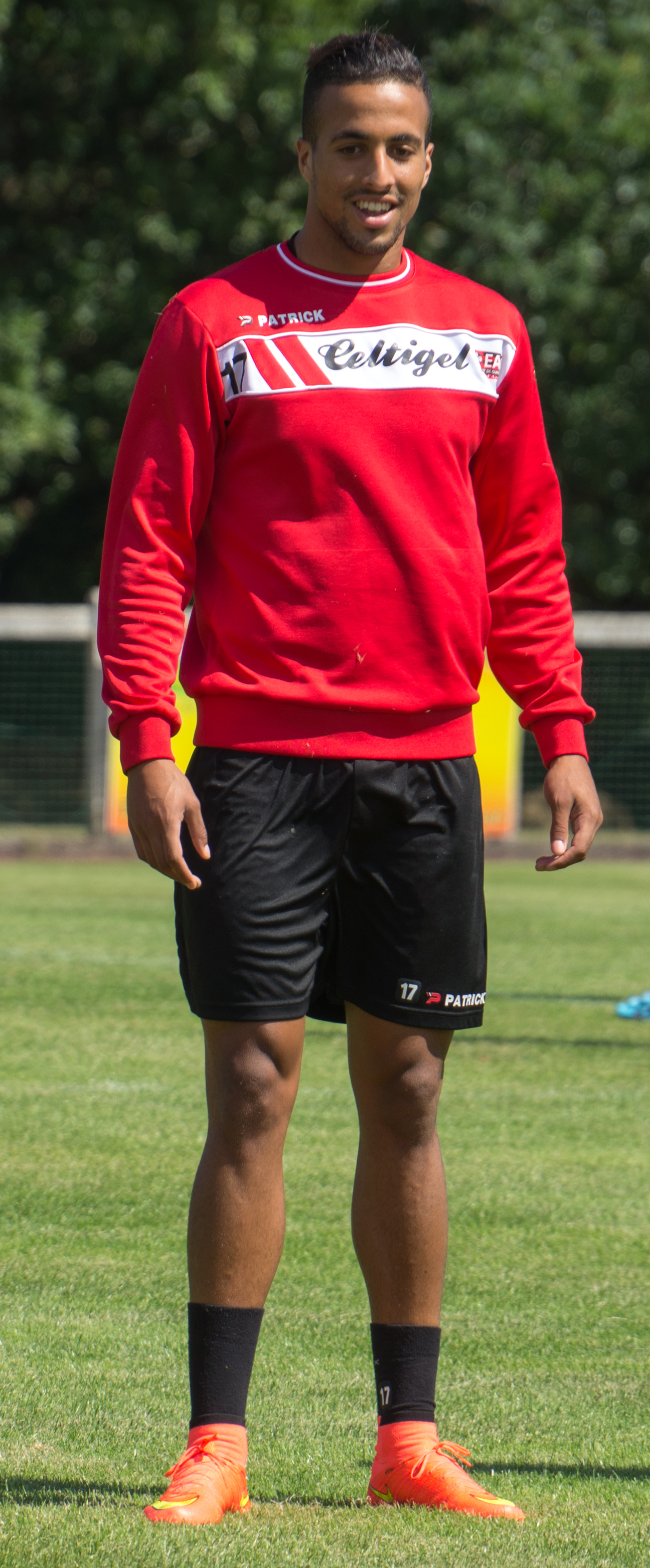 Rachid Alioui à l'entrainement le 10 juillet 2014